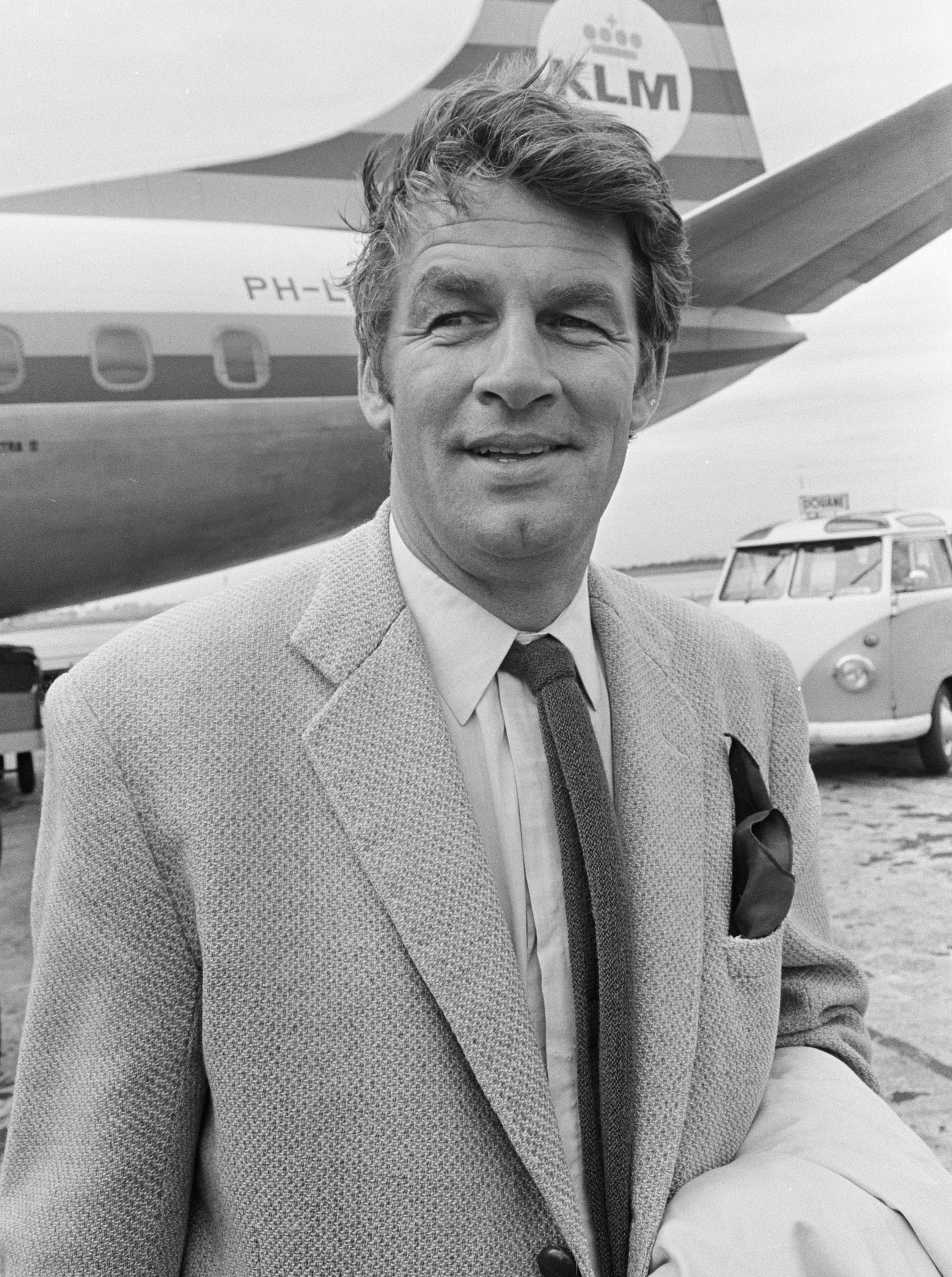 Aankomst Bill Travers (filmacteur) op Schiphol (kop)